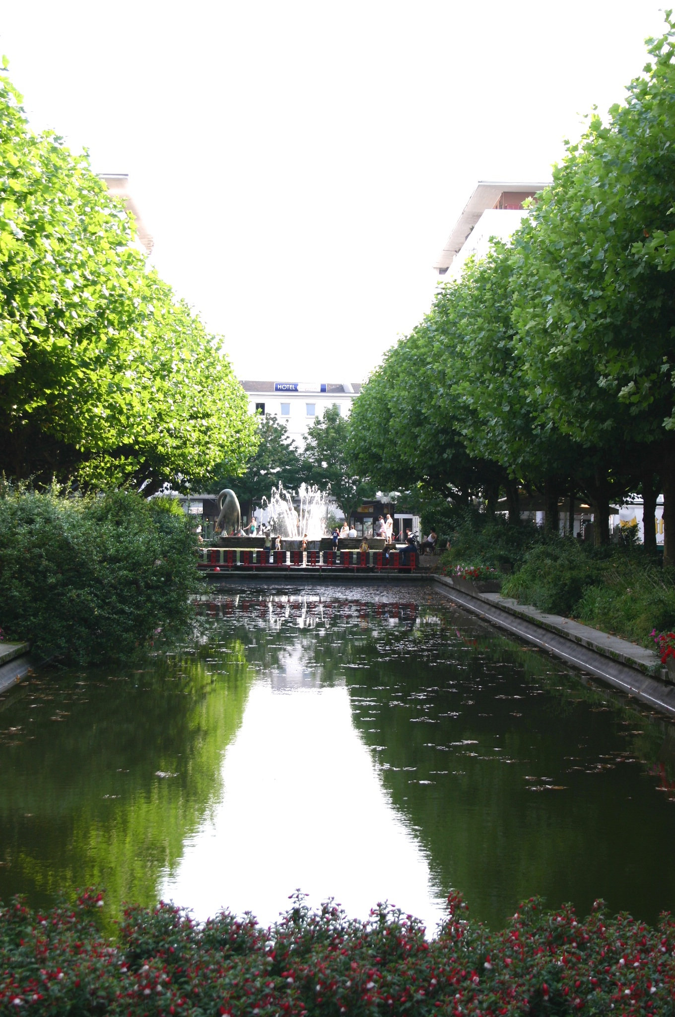 Friedensplatz in Oberhausen (Rhld.)